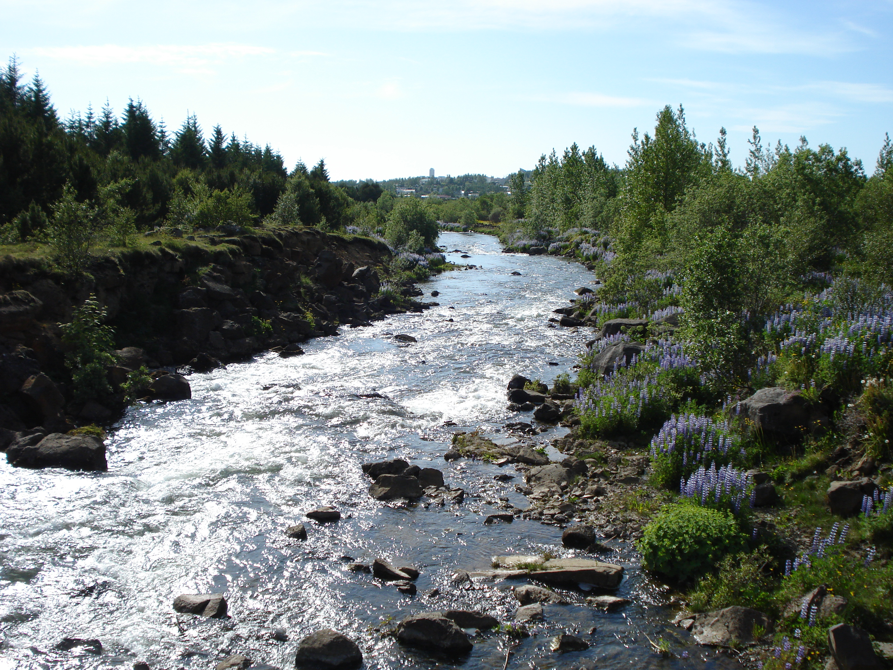 Elliðaár, Reykjavik, Iceland